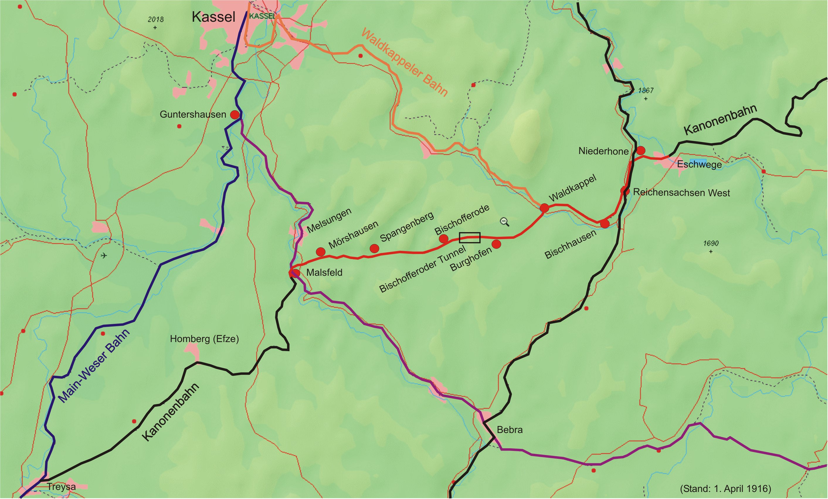 Eschwege - Niederhone und Niederhone - Malsfeld